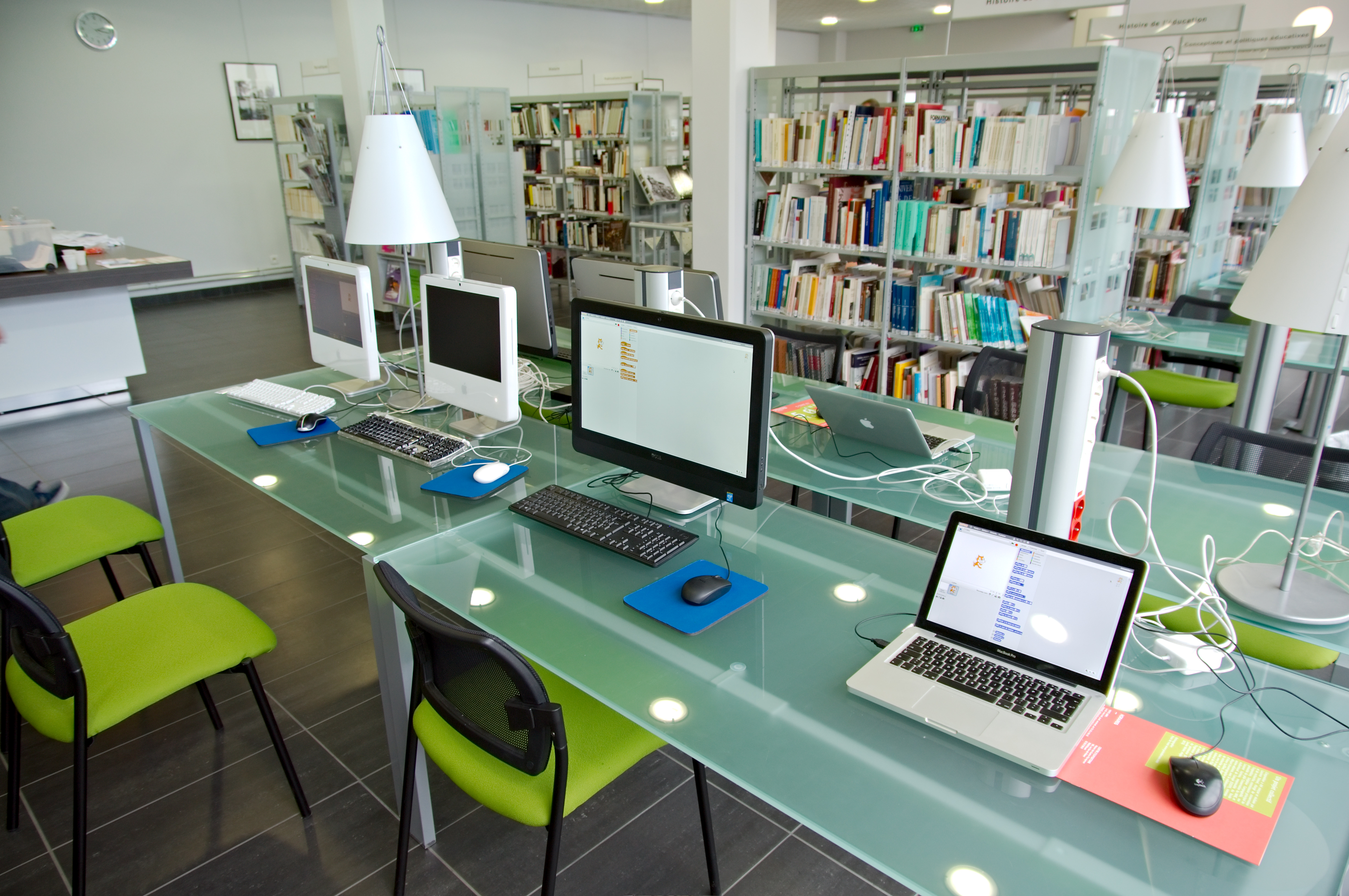 Salle du centre de ressources du Musée National de l'Éducation, rue de Bihorel à Rouen